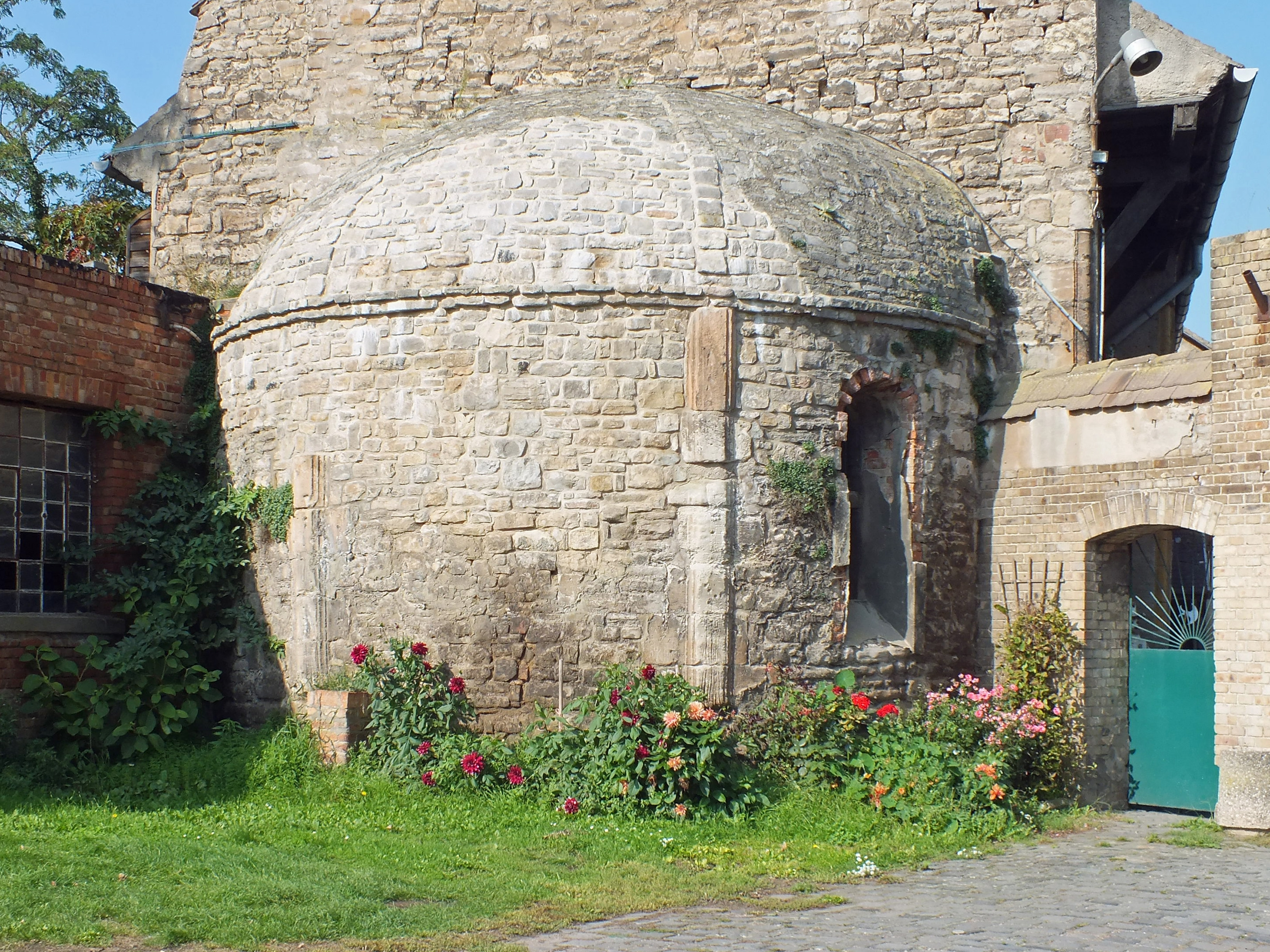 Schloss Seeburg - Apsis der Kirche des durch Wichmann II. 1172 gegründeten Kollegialstifts